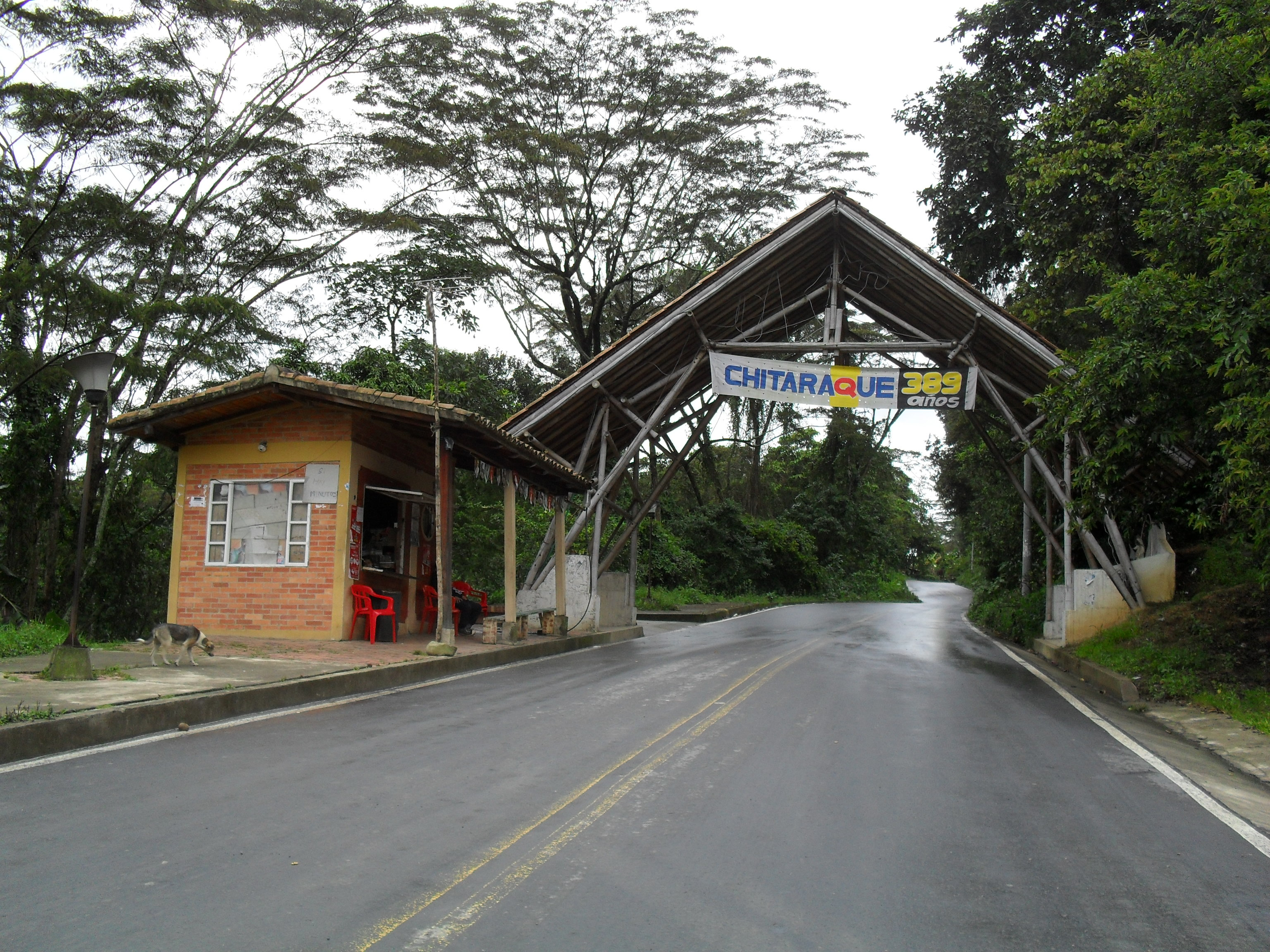 Entrada por carretera al municipio de Chitaraque, Boyacá, Colombia